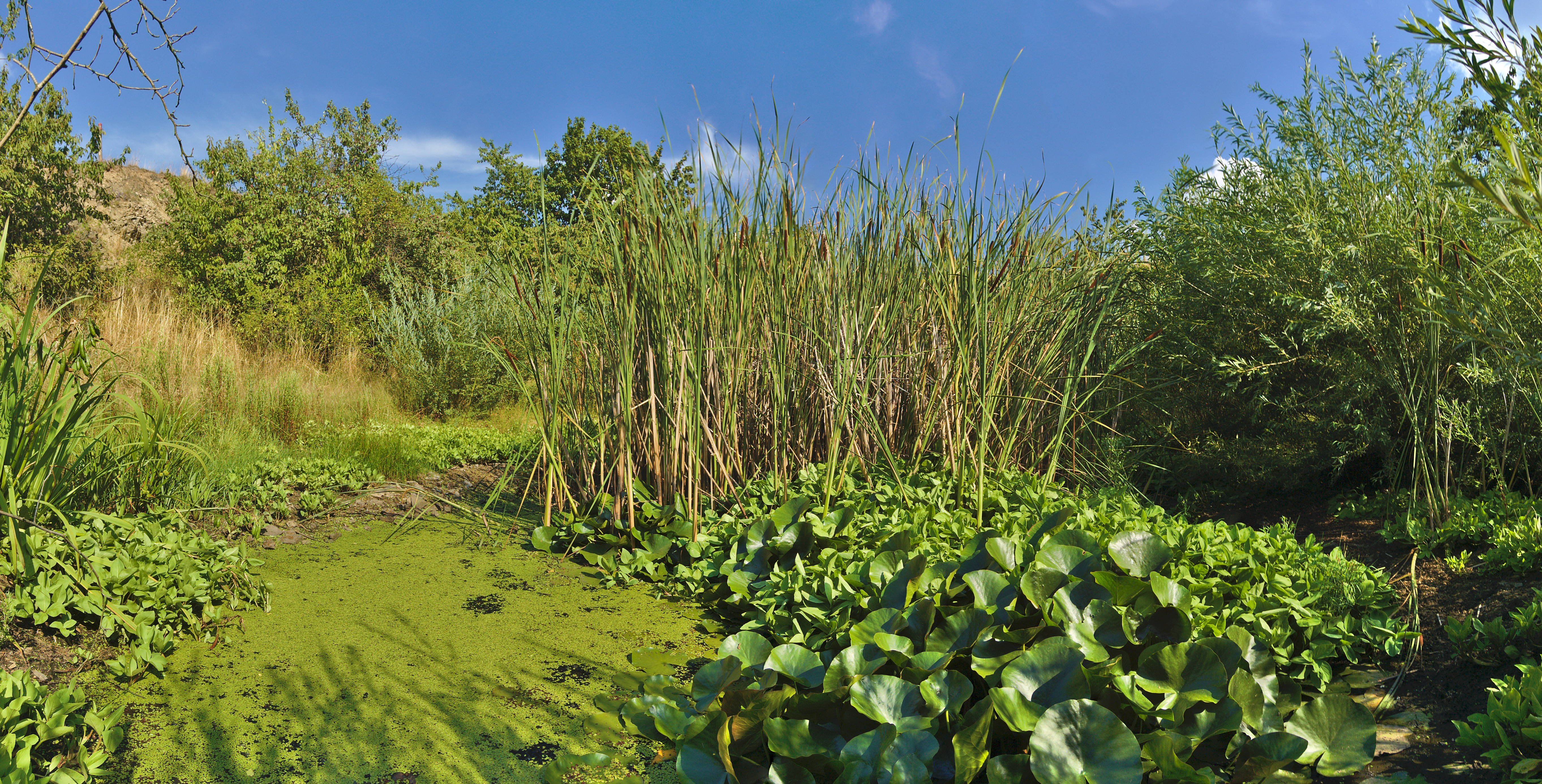 Přírodní památka Ohrozim-Horka, okres Prostějov